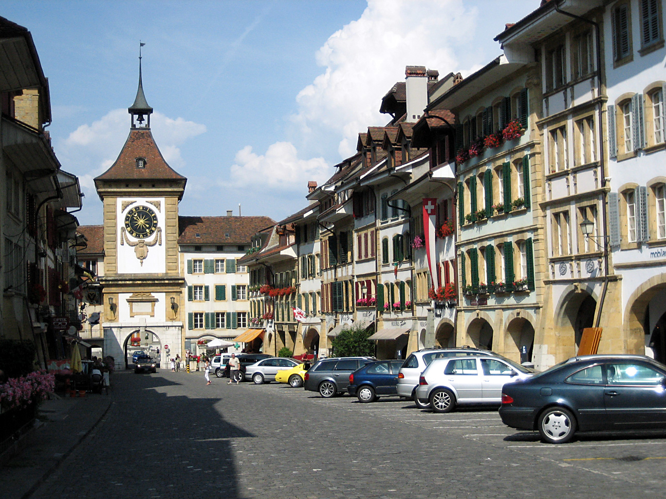 Hauptgasse und Berntor in Murten, Schweiz